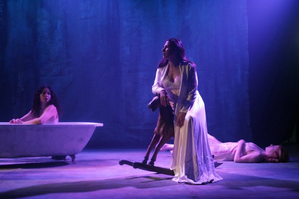 אהובה קרן מתוף המופע-ערב שירי יונה וולך בתיאטרון תמונע.